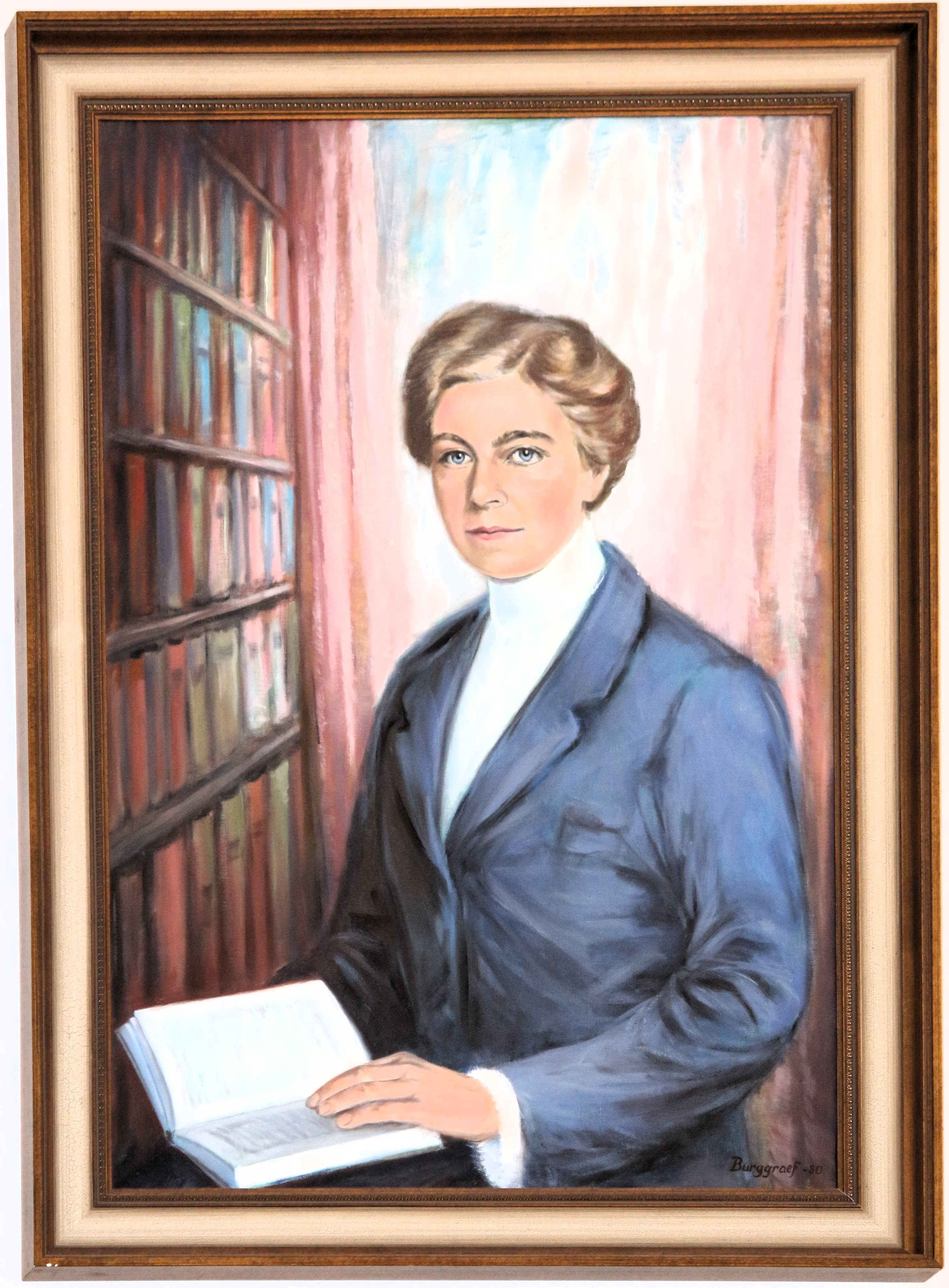 Bennata Otten - Gemälde in der Stadtbibliothek Lübeck